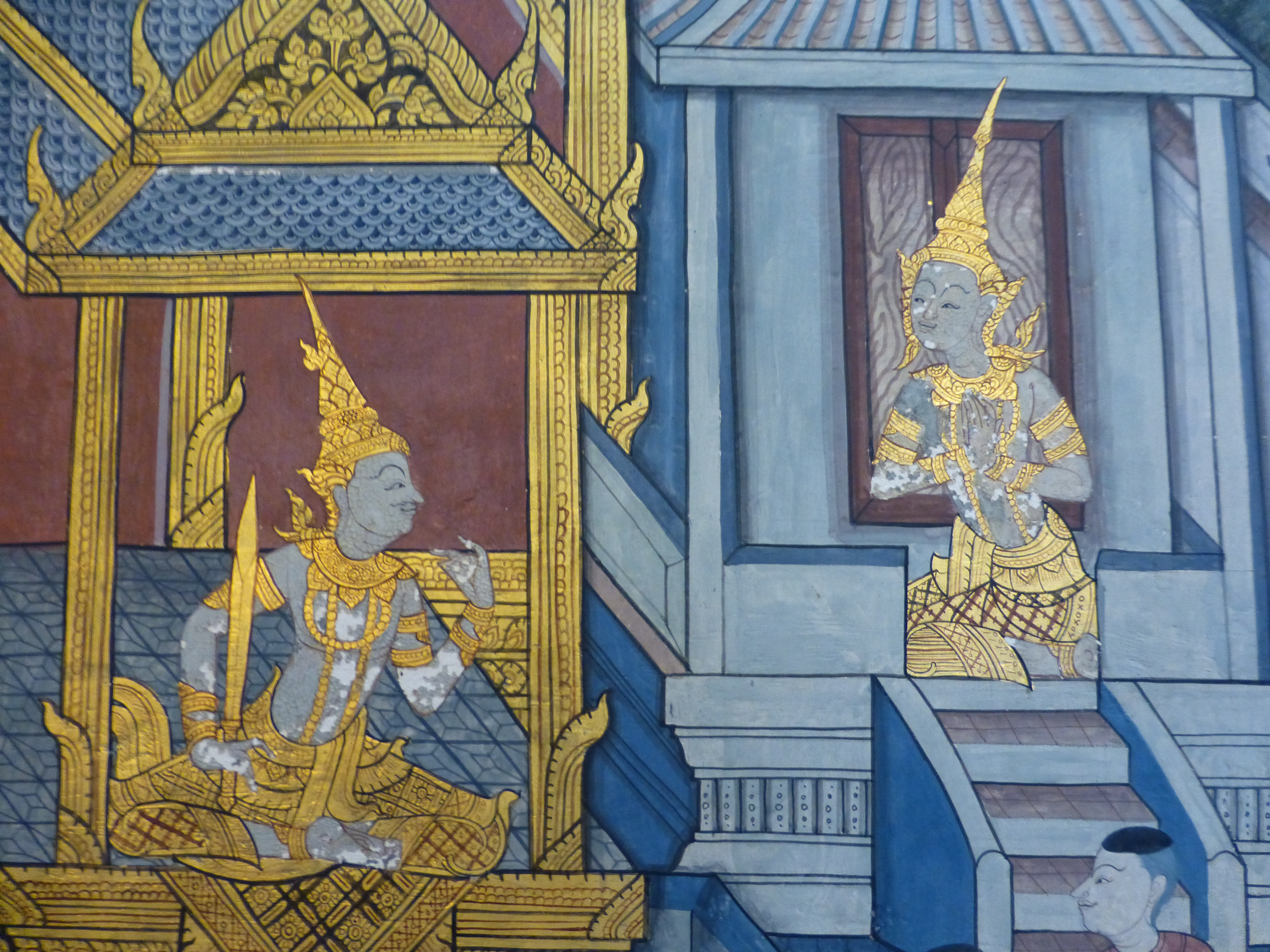 Wat Pho, Bangkok